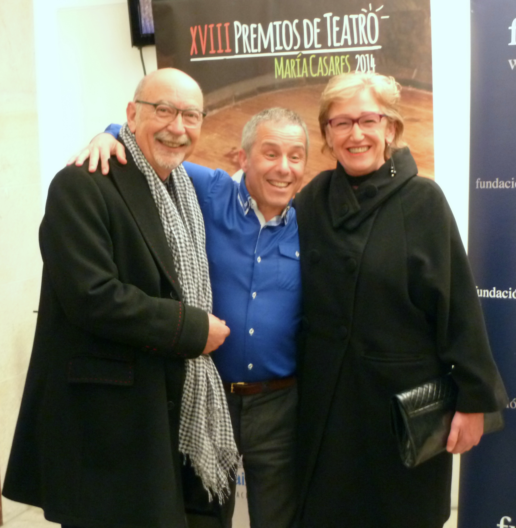 Ernesto Chao, Avelino González e Rosa Álvarez na gala dos premios María Casares 2014.